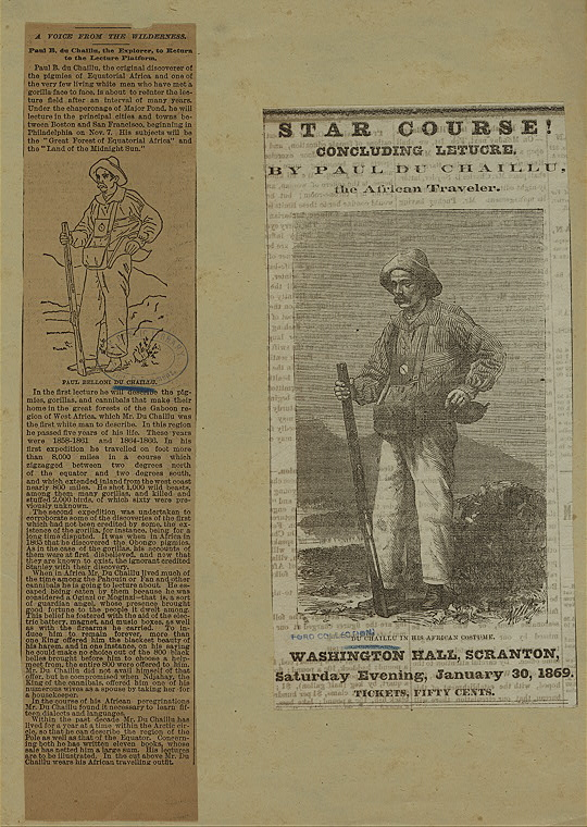 Conférence de l'explorateur Paul Belloni Du Chaillu à Scranton en 1869 (revue de presse)